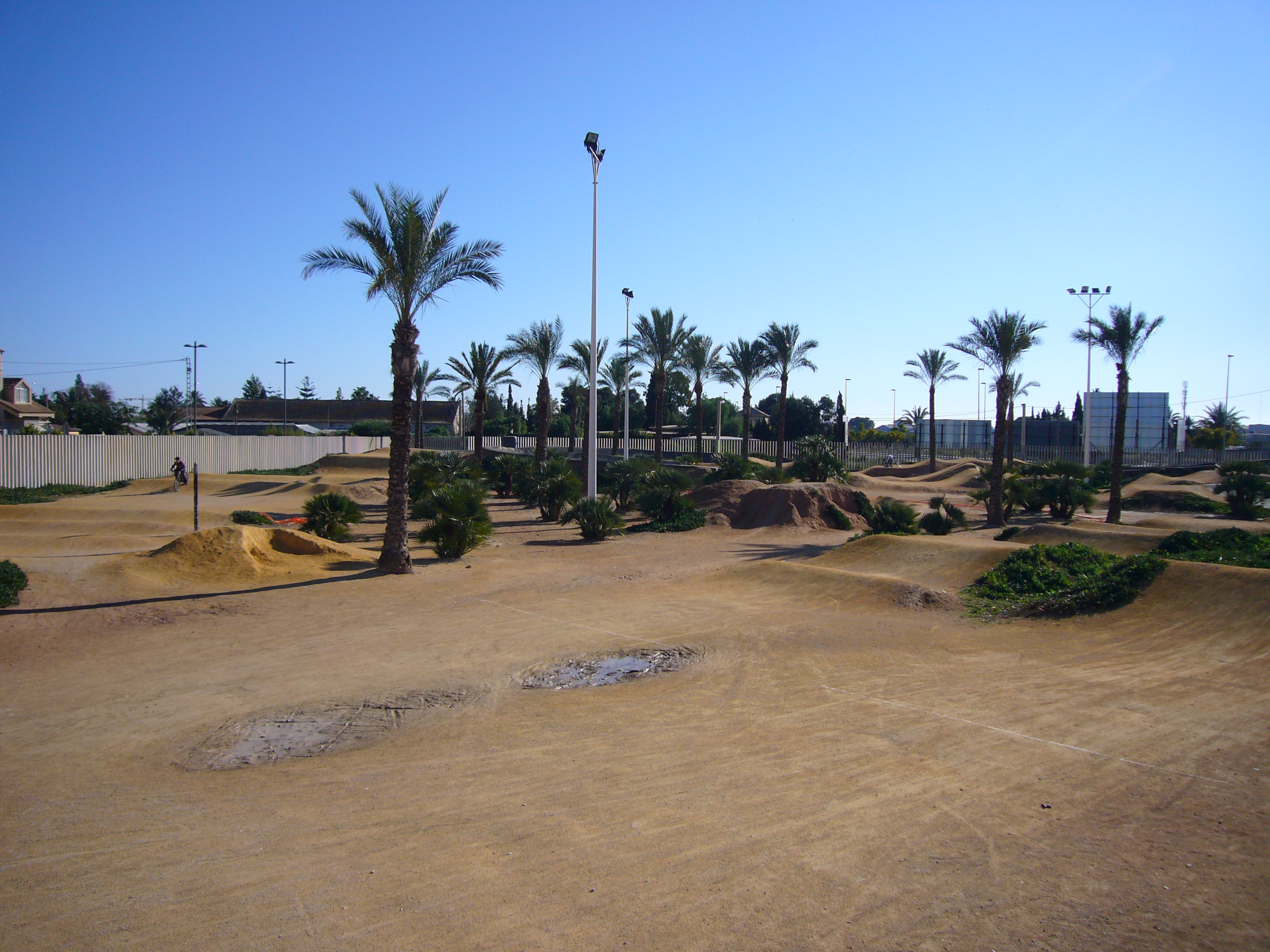 Pista de BMX del Parque Huerto Lo Torrent de San Vicente del Raspeig (Alicante).